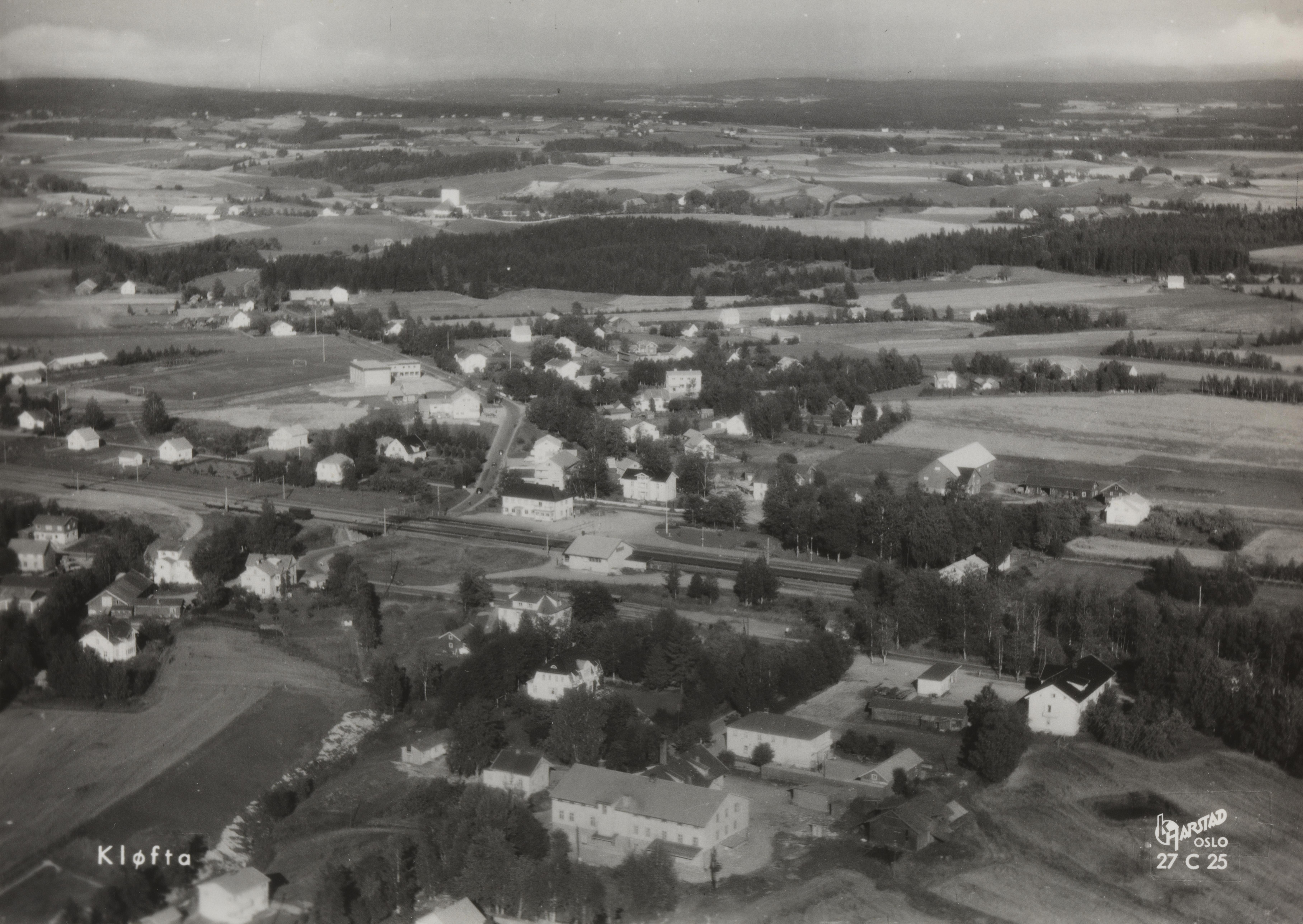 Bildet er hentet fra Nasjonalbibliotekets bildesamling Kløfta, Ullensaker, Akershus